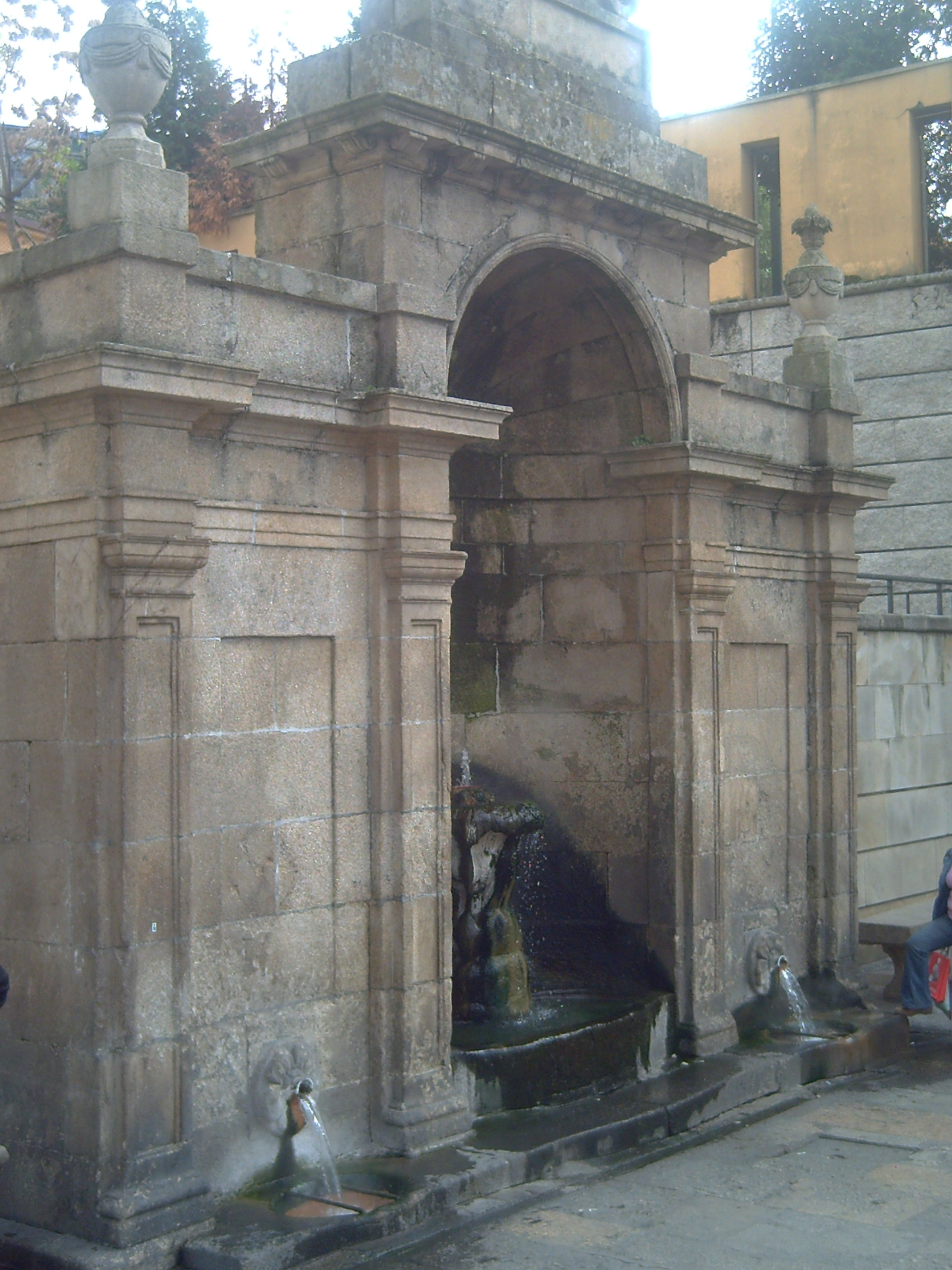 Burga de Abaixo, vista lateral, Ourense